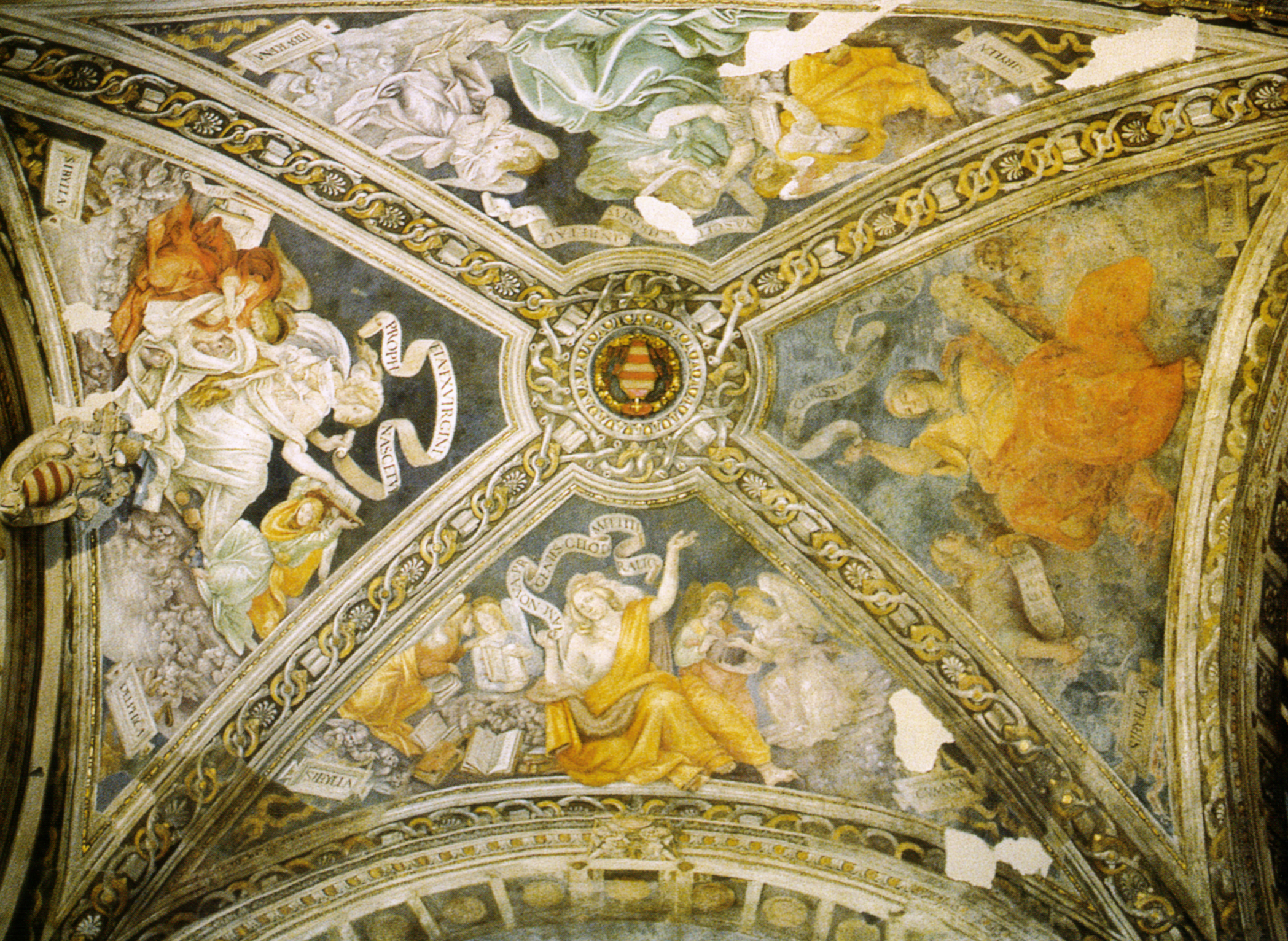 LIPPI, Filippino Assumption and Annunciation Fresco Santa Maria sopra Minerva, Rome